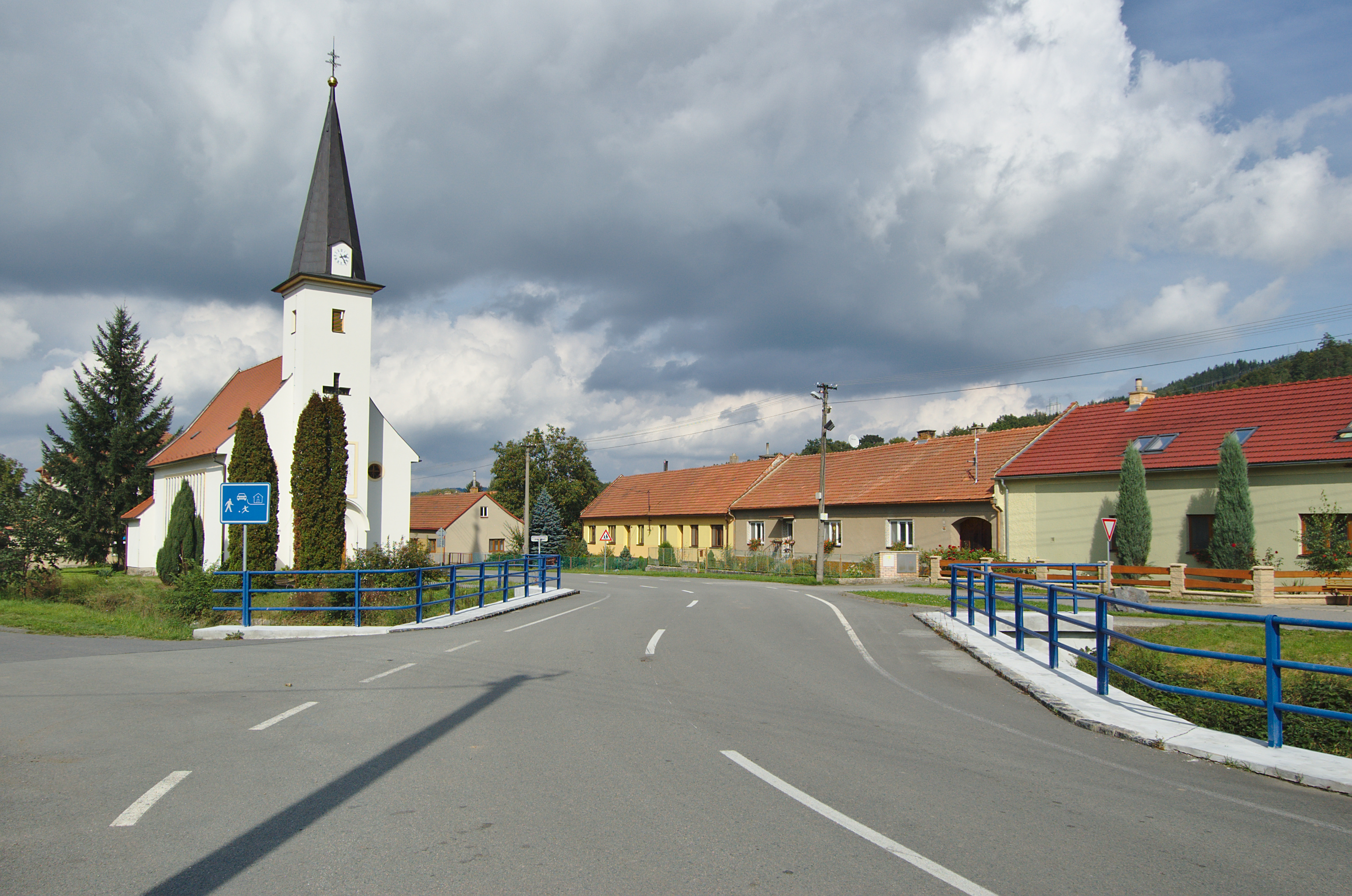 Kostel svatého Cyrila a Metoděje, Úsobrno, okres Blansko